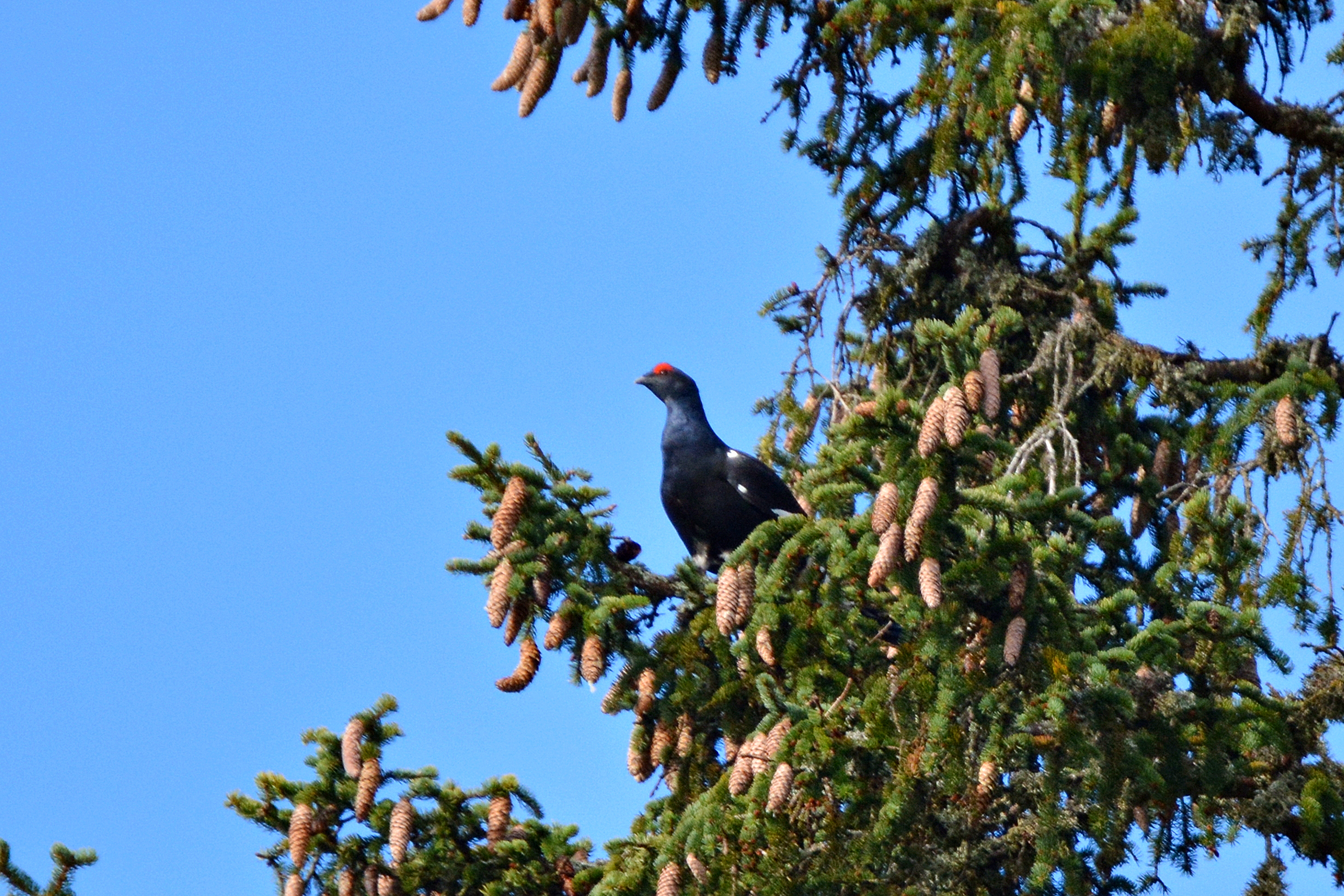 Birkhahn beim Sichern in einer Fichte